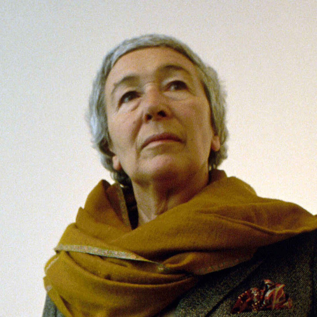 L'architetto Gae Aulenti a Palazzo Grassi di Venezia nel 1986